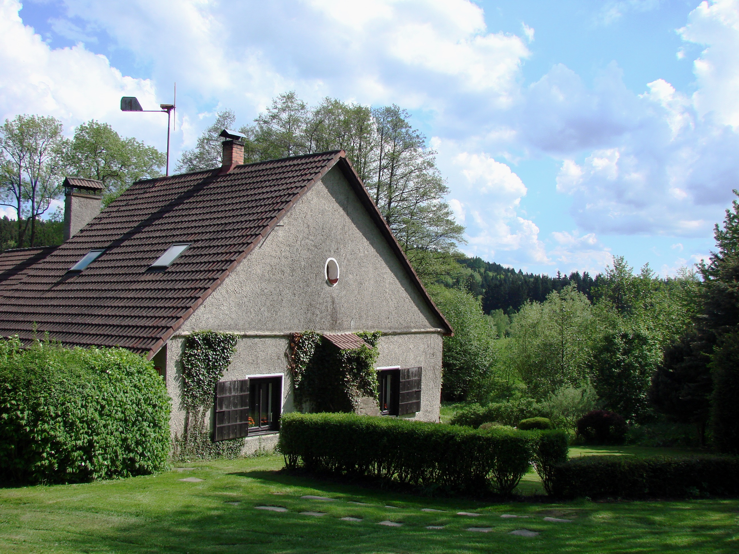 Skořetín (Škvořetín), bývalý poplužní dvůr, místní část obce Rozsochatec, okres Havlíčkův Brod, Kraj Vysočina.